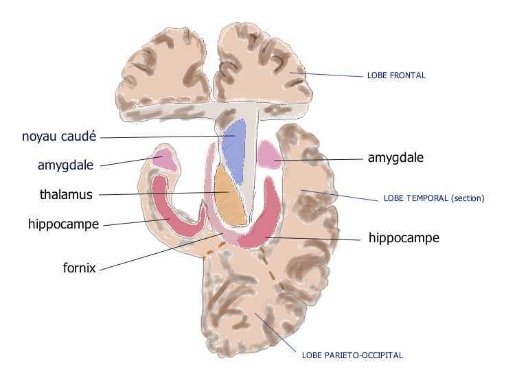 Amygdale, hippocampe et fornix sur une coupe anatomique, d'après Digital Anatomist Project (Univ of Washington), dessin à la tablette graphique et Artweaver